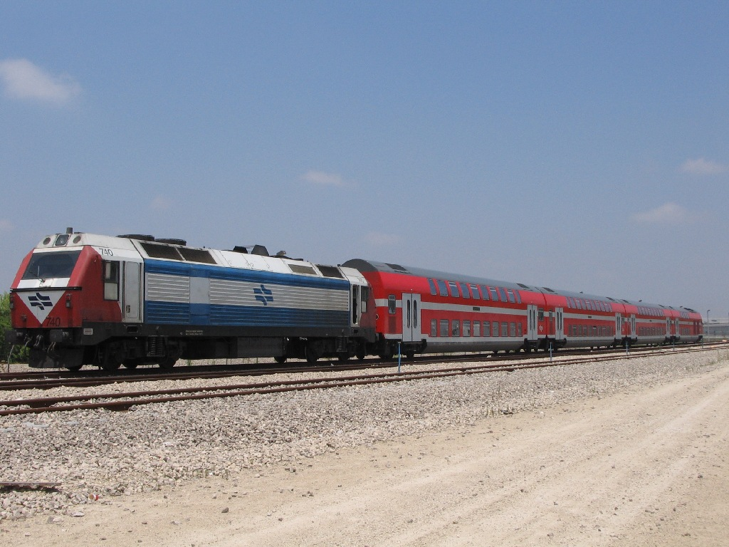 רכבת מדויירת בתחנת הרכבת נתב"ג תפעולית